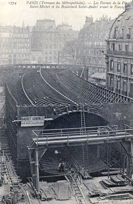 Carte postale ancienne éditée par ND, n°1774 :Paris - Travaux du Métropolitain - Les fermes de la place Saint-Michel et du boulevard Saint-André avant le fonçageStation Saint-Michel - Ligne 4 du métro de Paris